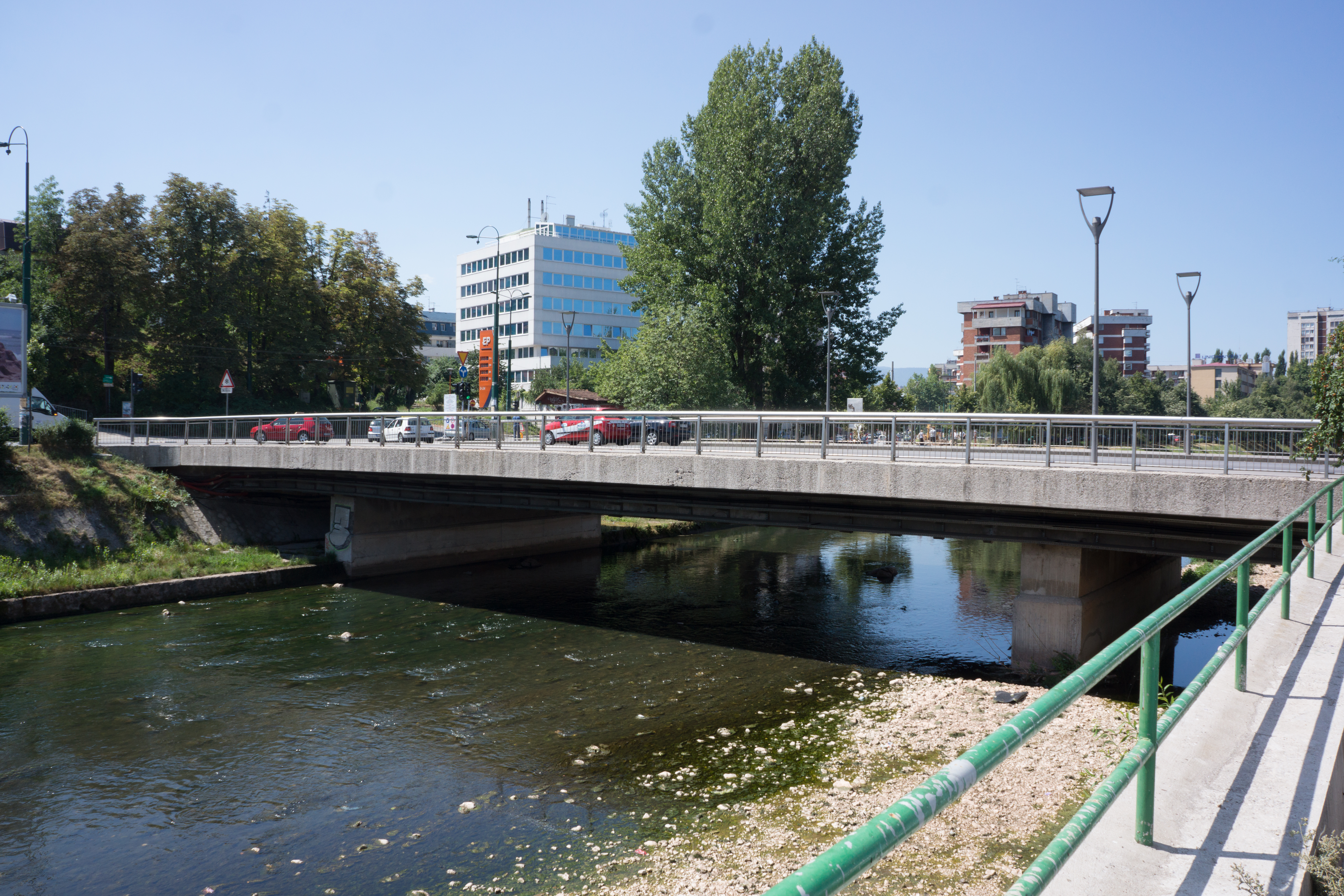 Pont Suada et Olga à Sarajevo.